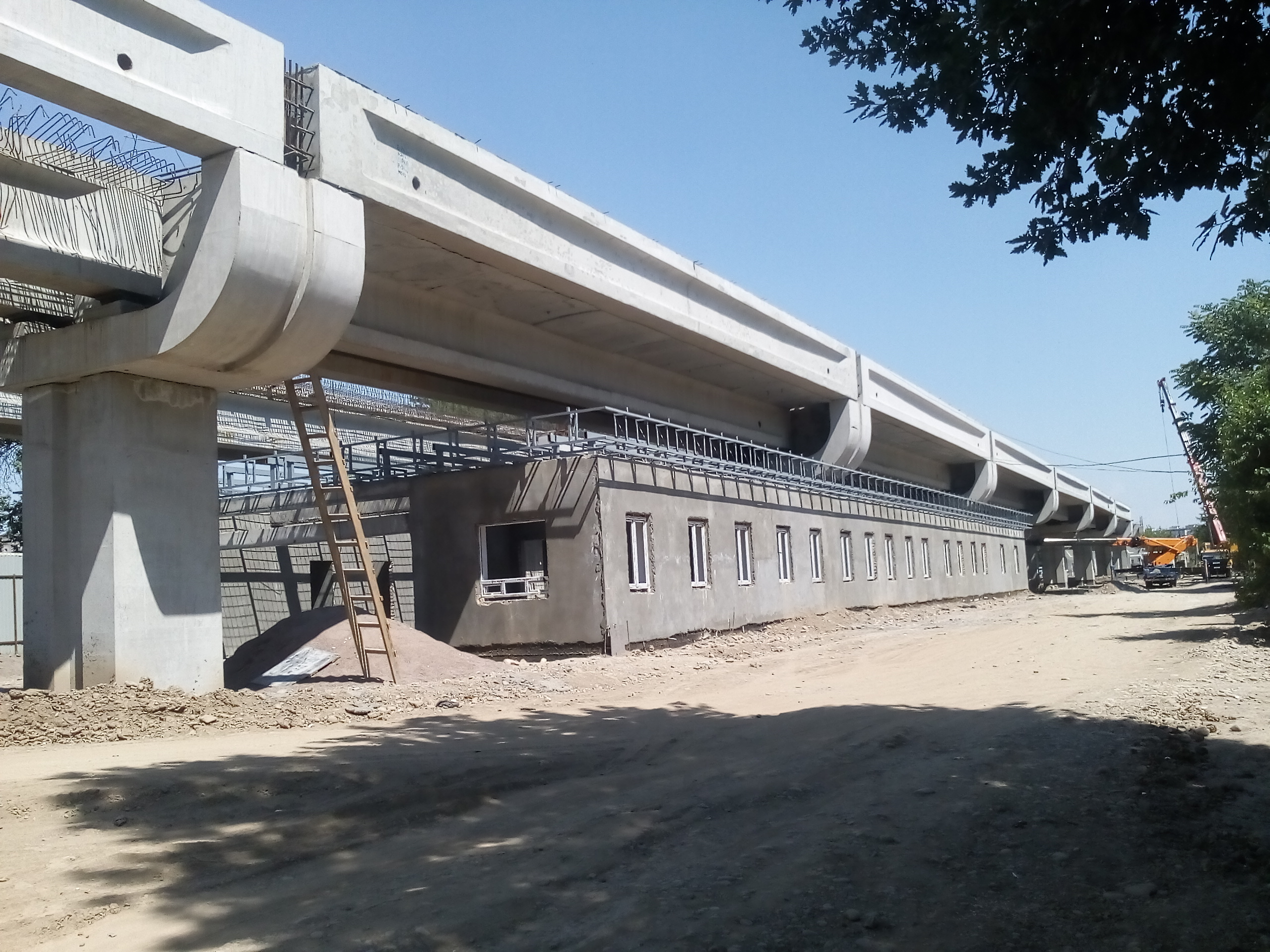 Строительство станции Ахангаран (Ташкентский метрополитен)